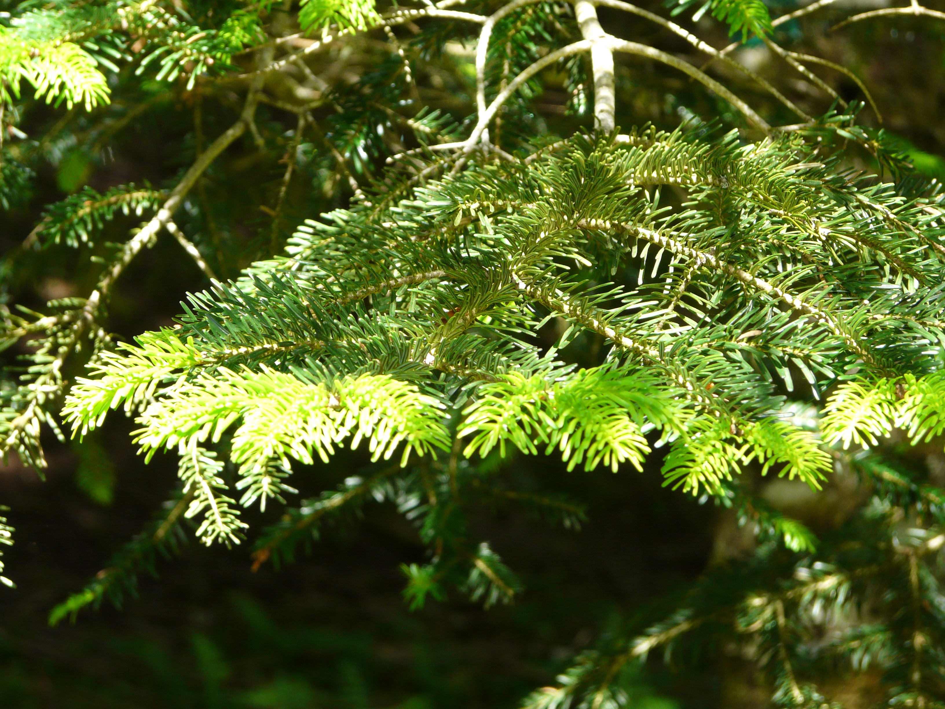 Rameau d'Abies nebrodensis, arboretum de la forêt domaniale de Luchon, Bagnères-de-Luchon, Haute-Garonne, France.